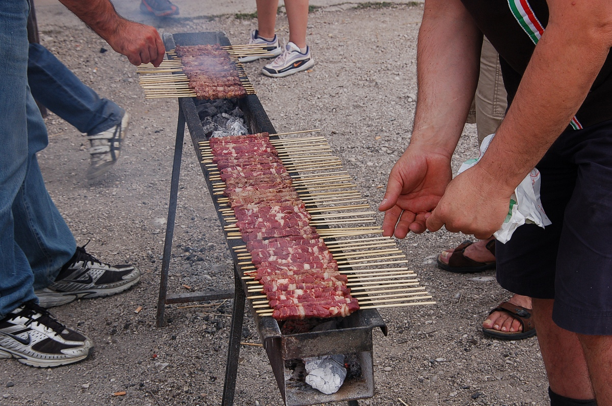 Arrosticini am Campo Imperatore